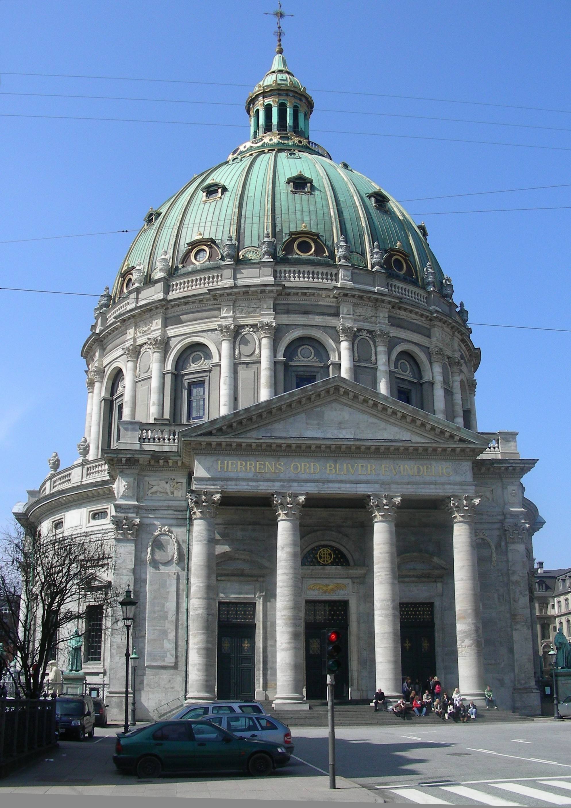 Marmorkirken (Marble Church) in Copenhagen, Denmark. Front view.